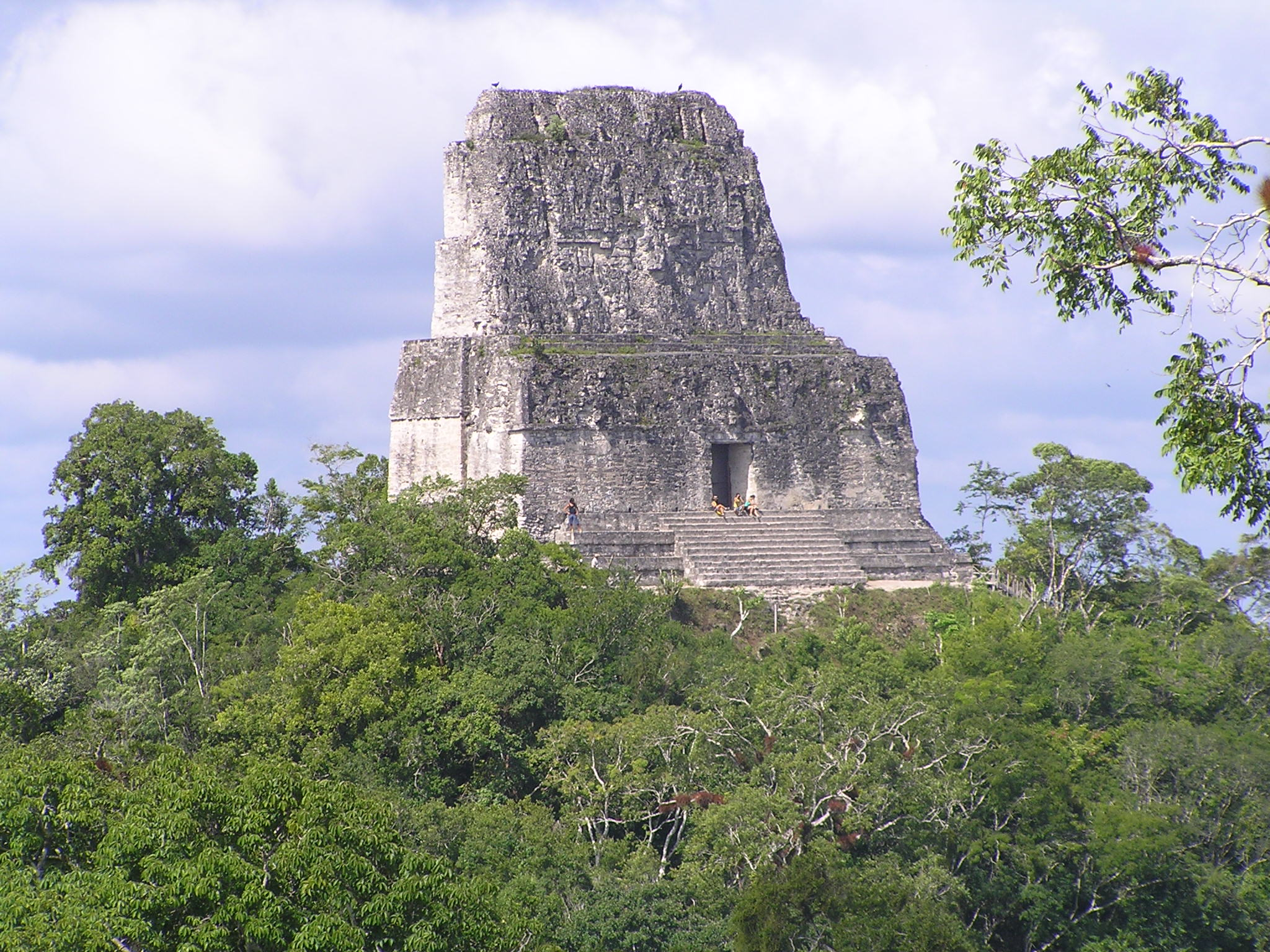 Templo IV